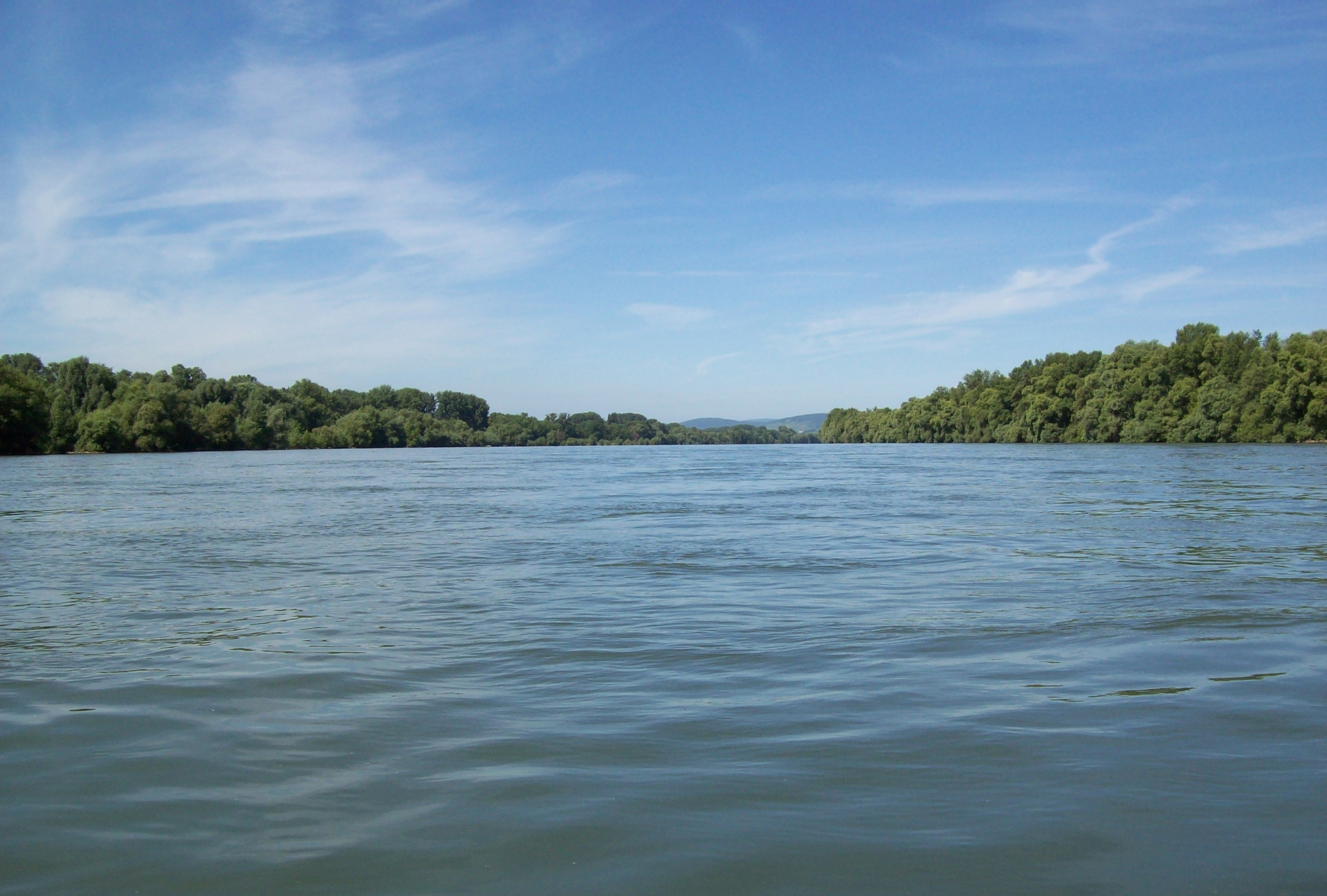 Große Gieß. Linksrheinischer Arm des Rheines etwa bei Stromkilometer 514 Blick flußabwärts.